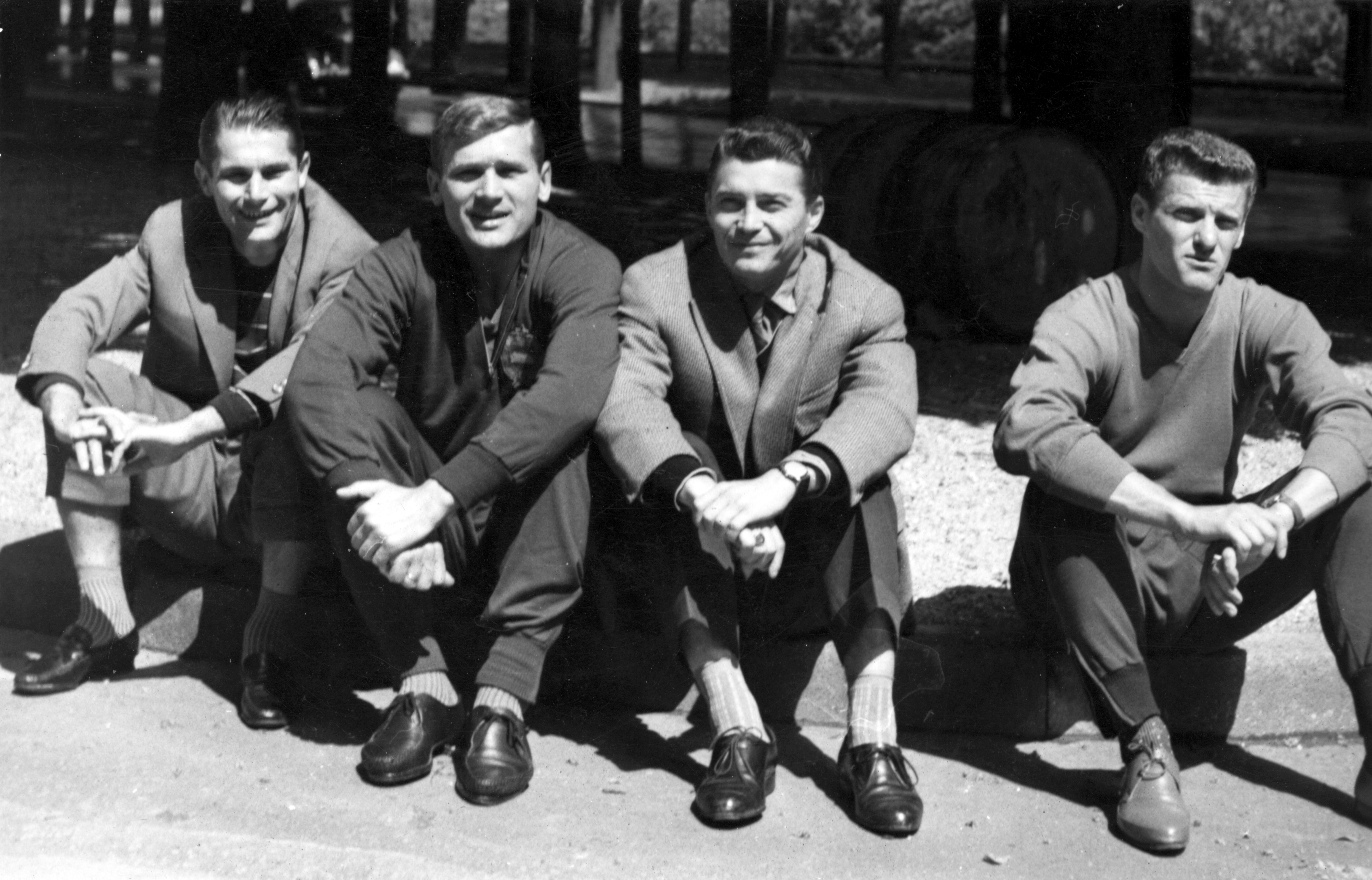 Válogatott futballisták: Sándor Károly, Tichy Lajos, Kotász Antal, Sipos Ferenc. Title: Válogatott futballisták: Sándor Károly, Tichy Lajos, Kotász Antal, Sipos Ferenc.